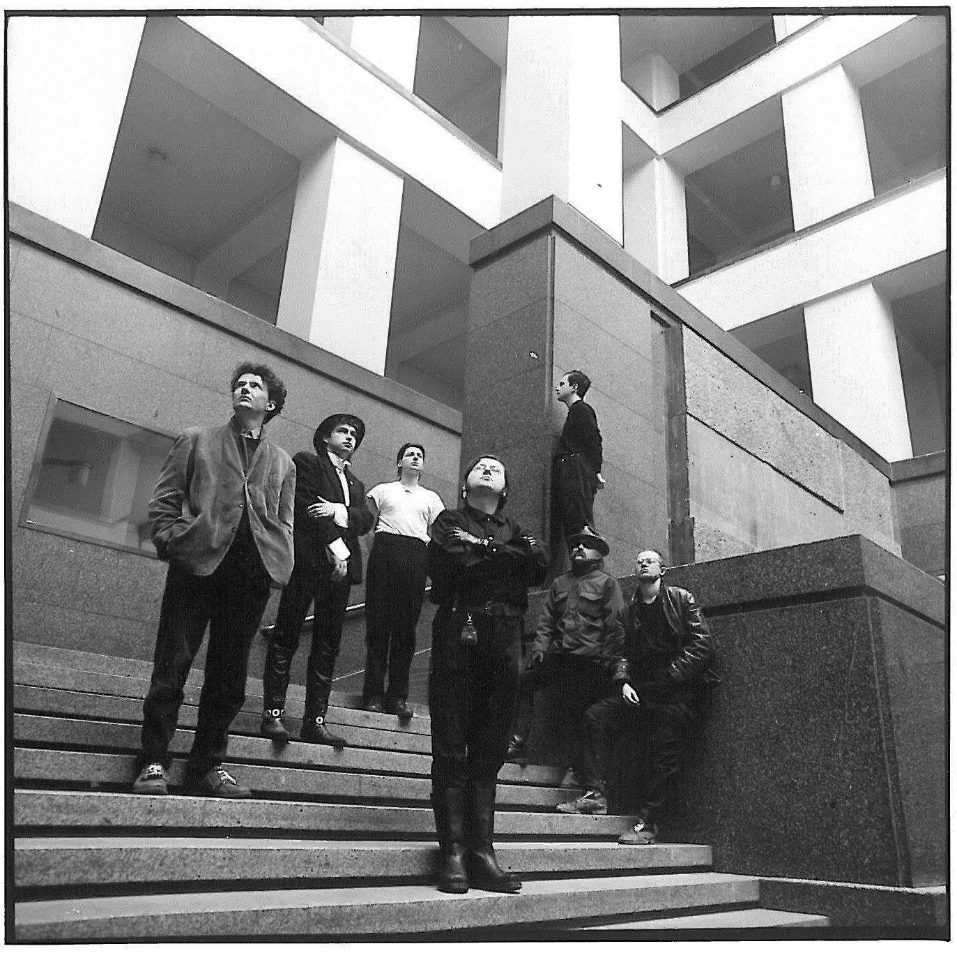 Paprsky inženýra Garina v sestavě s Jardou Palátem kolem roku 1988